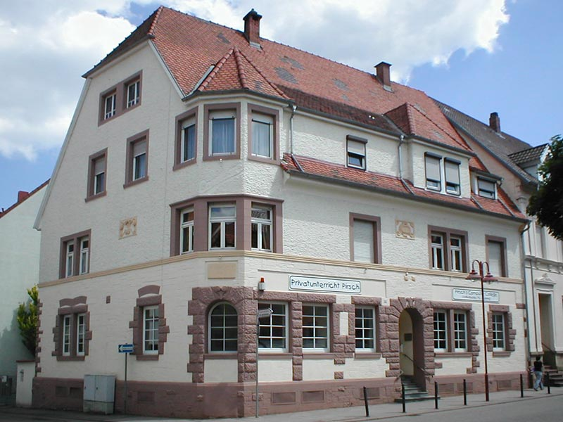 Ehemalige Konditorei, erbaut 1908, in Waibstadt